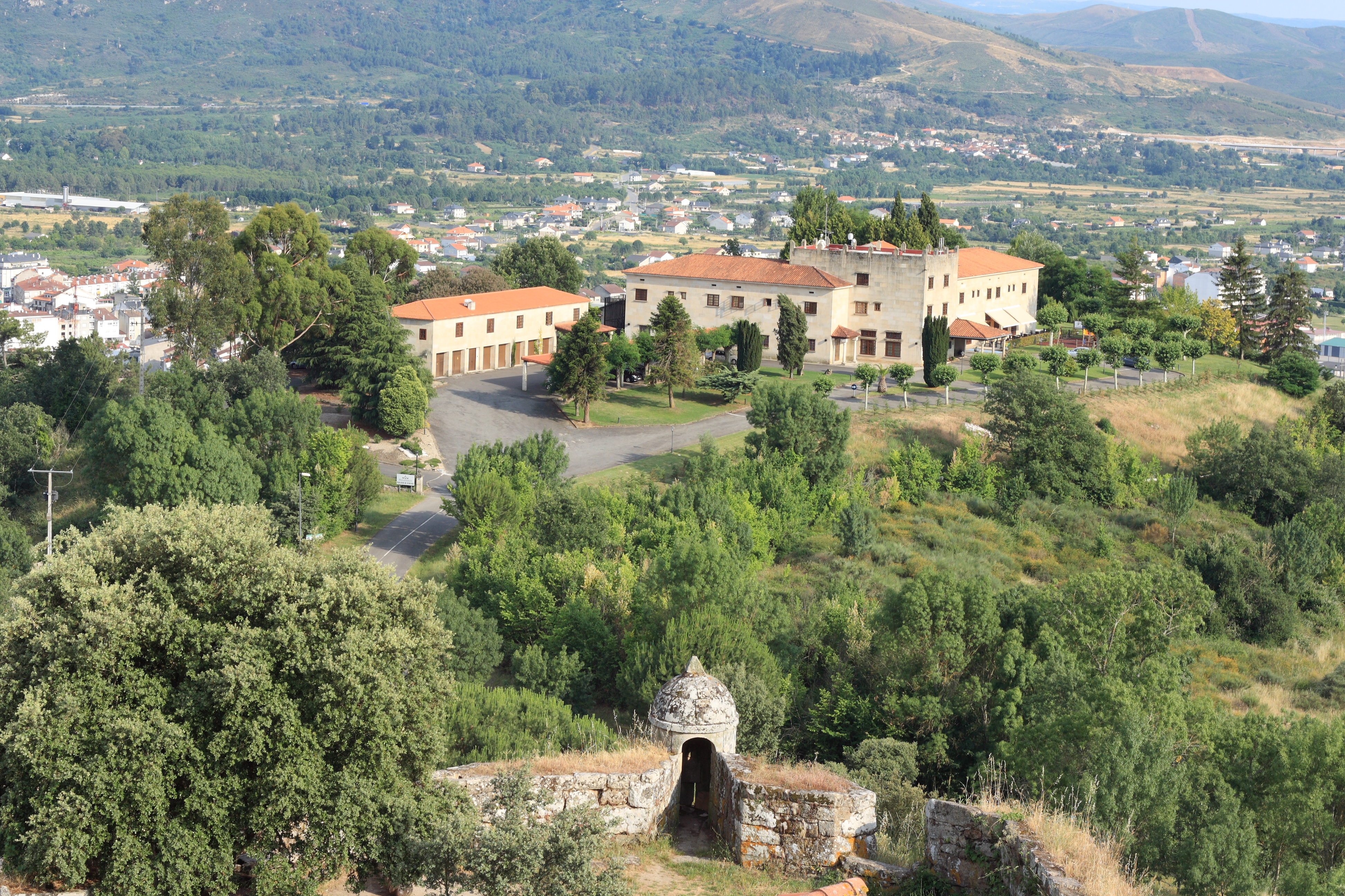 Parador von Verín in der spanischen Provinz Ourense (Galicien)